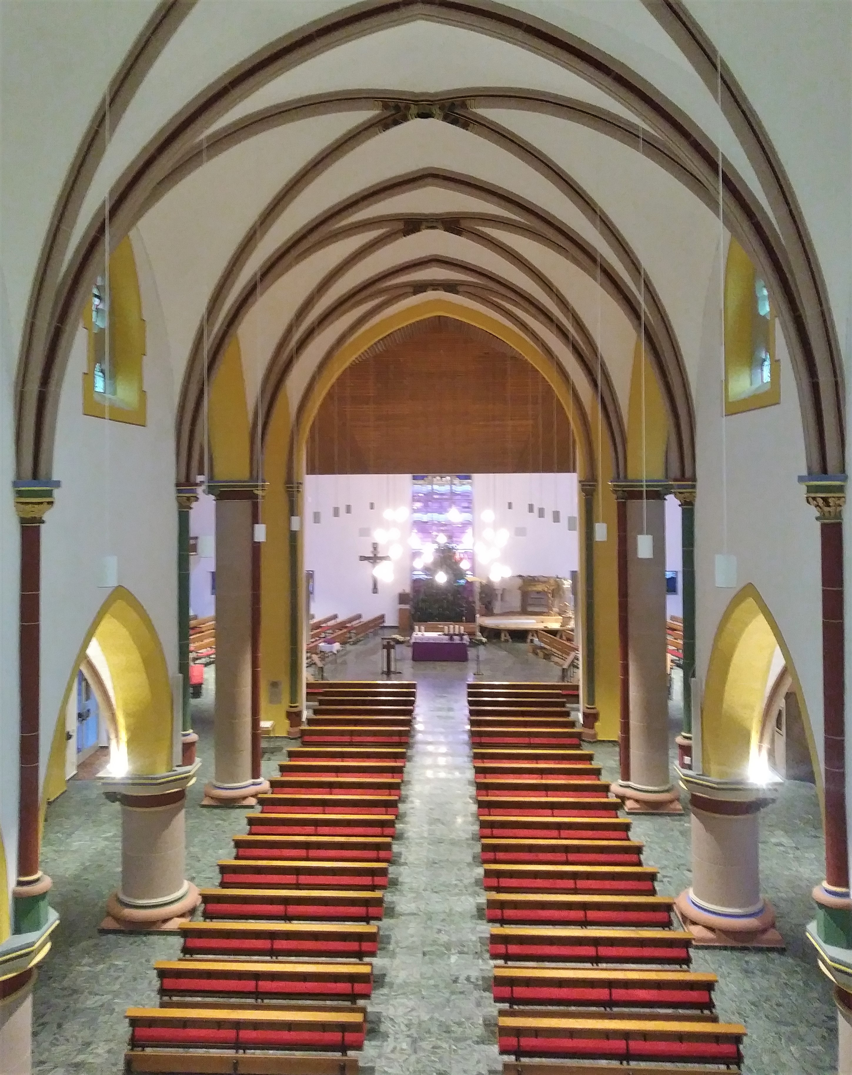 St. Bartholomäus Hasborn-Dautweiler nach der umfassenden Innenrenovierung 2019